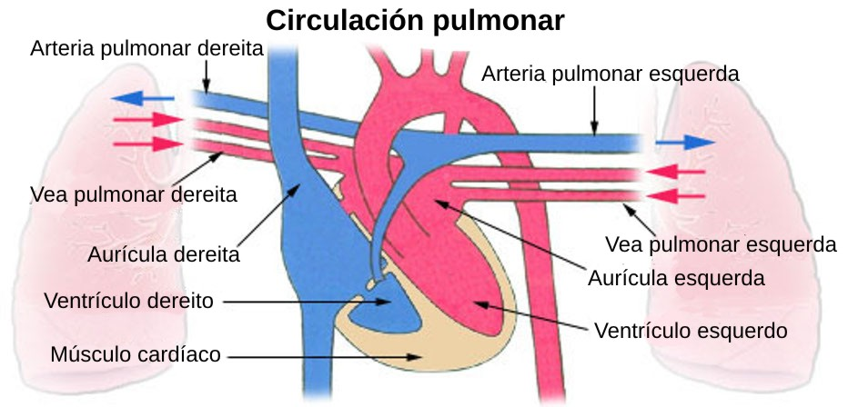 Esquema da circulación pulmonar